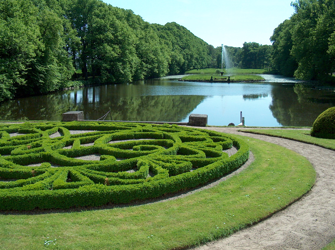 Glorup slotshave og sø